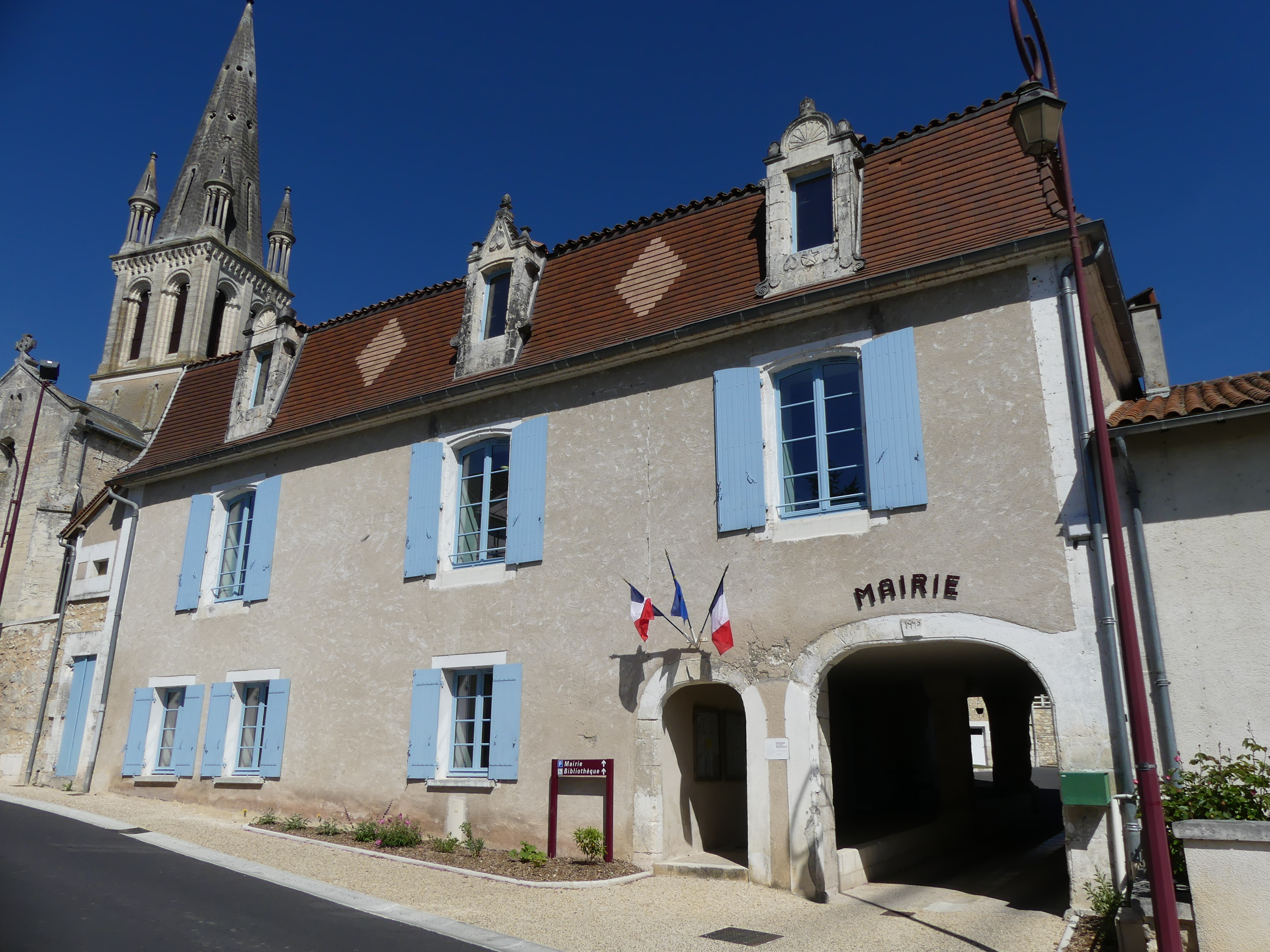 La façade sud de la mairie, Villetoureix, Dordogne, France.